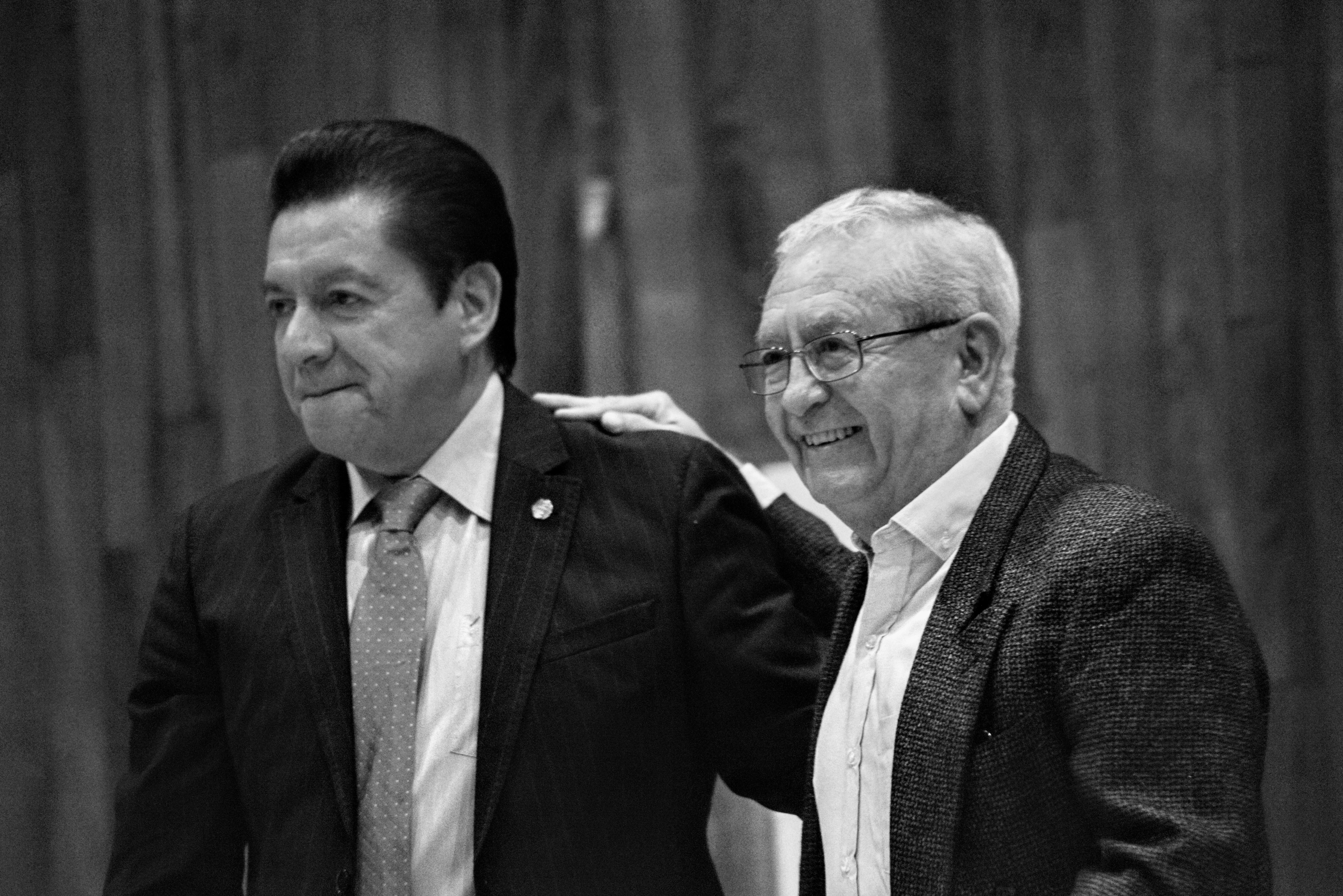 Francisco Araiza, Ignacio Clapés Patlán. Amistoso encuentro entre dos grandes exponentes de la ópera mexicana durante la conferencia magistral en la sala Xochipilli de la Facultad de Música, 22-VIII-2019